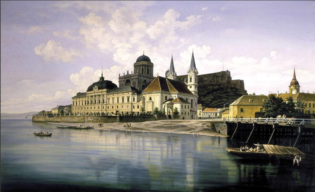 Hungarian: Esztergom, Vízivároslabel QS:Lhu,"Esztergom, Víziváros"